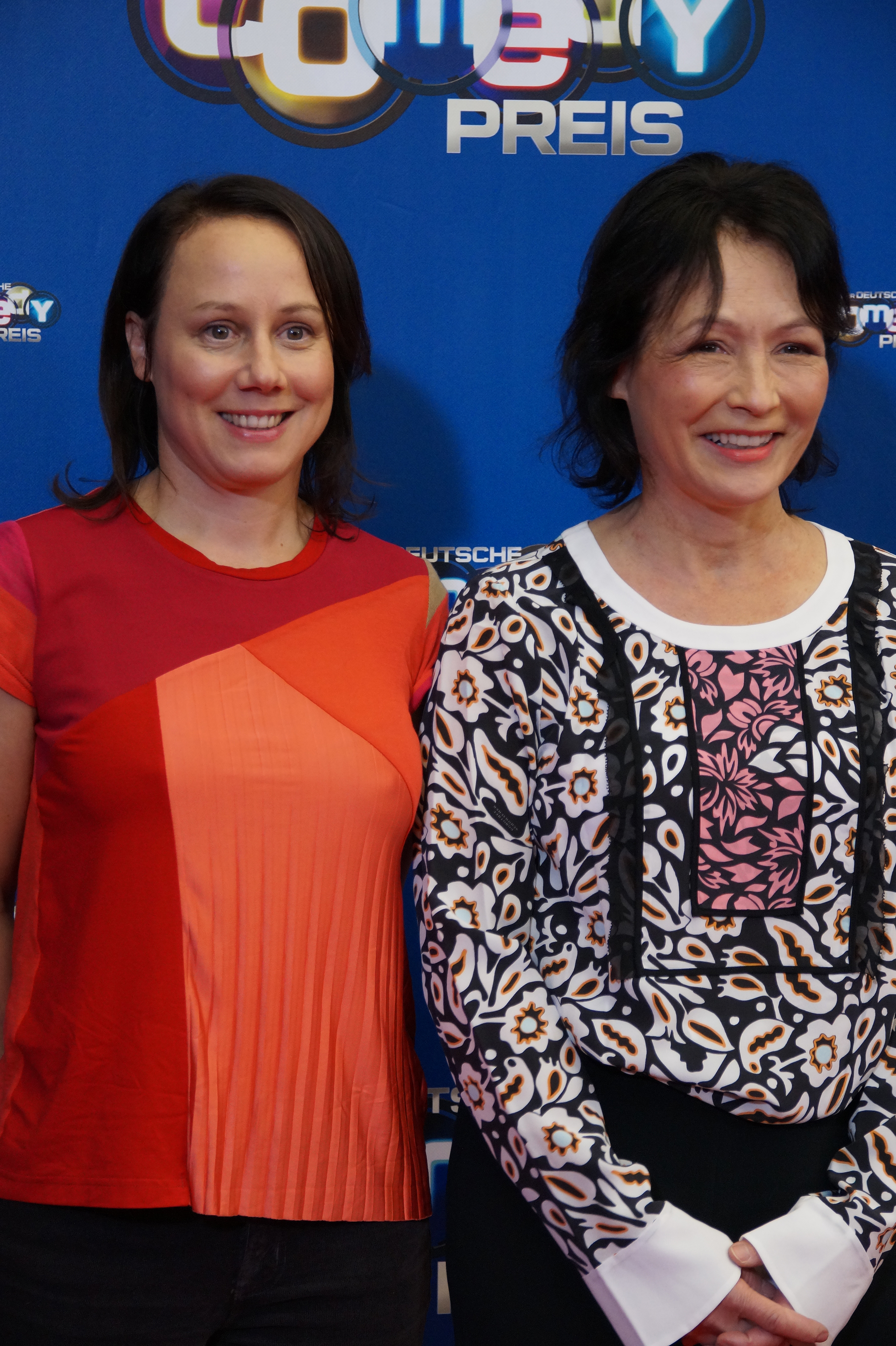 Eva Löbau und Anke Sevenich beim Comedypreis 2016, im Oktober 2016, Köln.